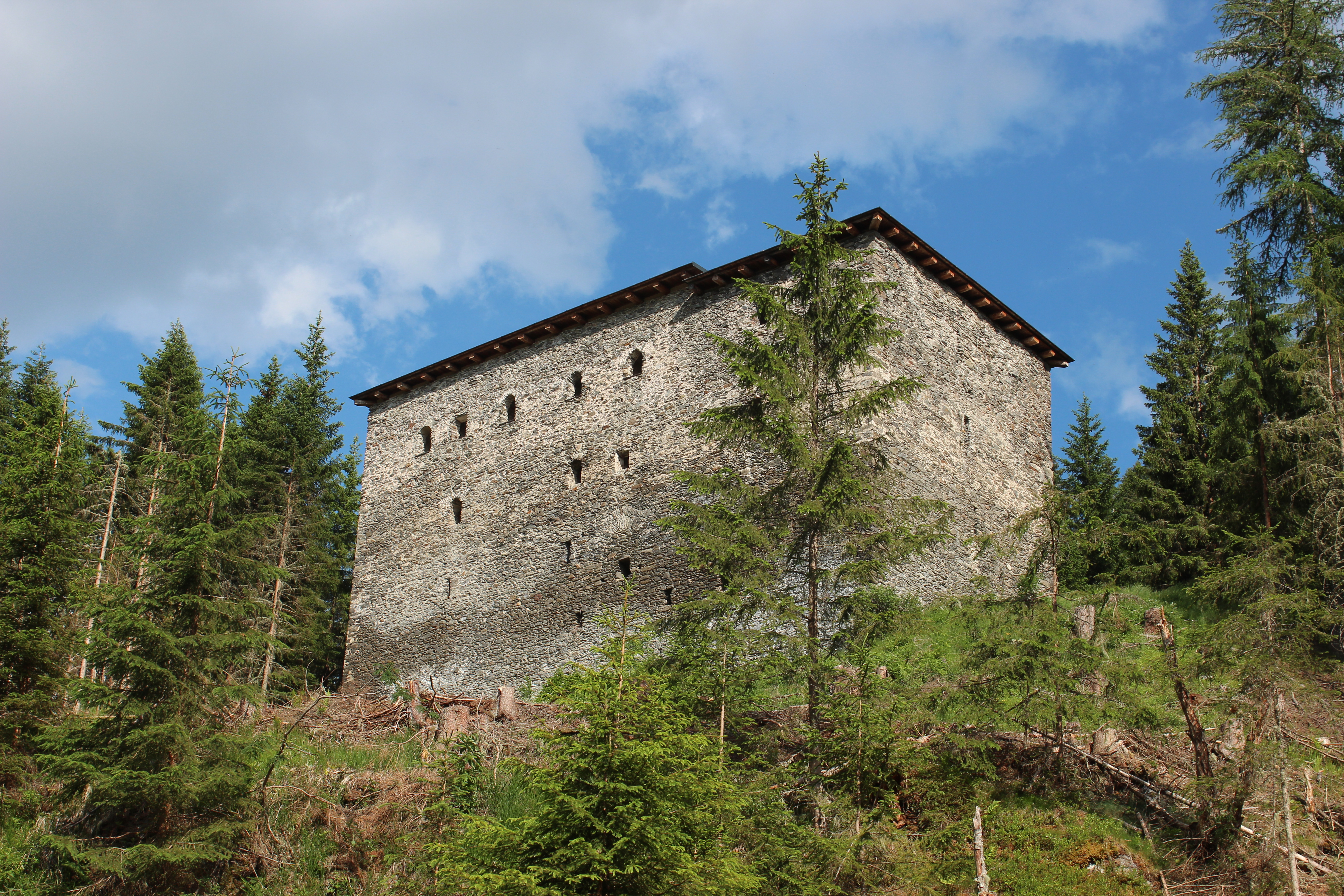 Burgruine Klausegg